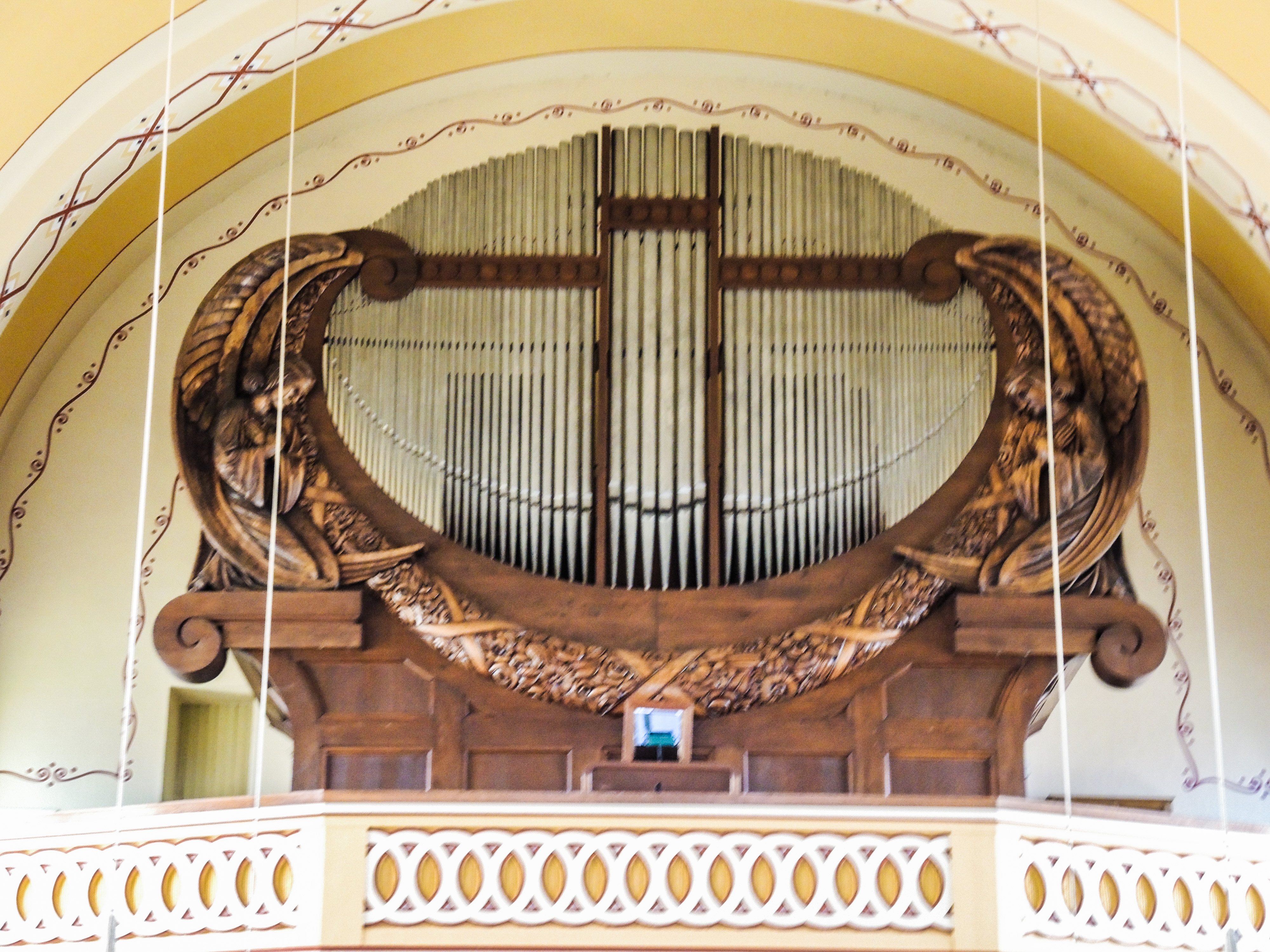 Orgue de l'église de Burnhaupt-le-Haut. Haut-Rhin